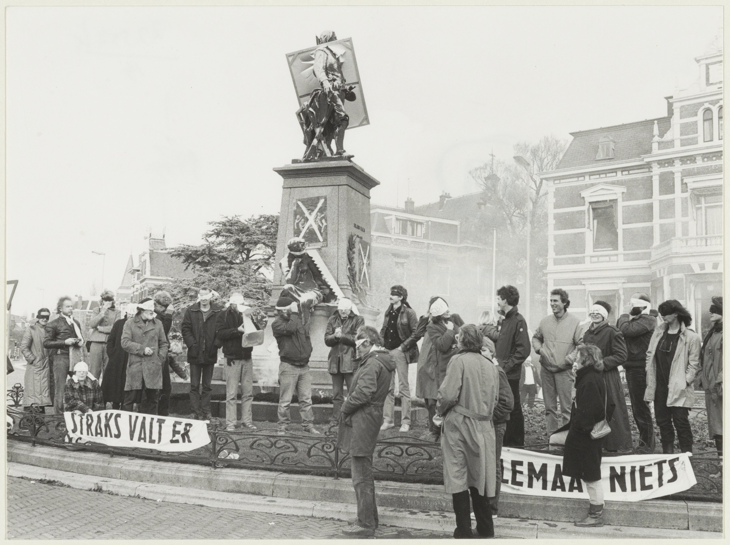 CollectieCollectie Fotoburo de BoerInventarisnummerNL-HlmNHA_54021403NL-HlmNHA_1478_22552kBeschrijvingProtest van kunstenaars bij het standbeeld van Frans Hals in het Florapark, tegen de verslechtering van de B.K.R.FotonummerNL-HlmNHA_1478_3883DocumenttypeHistorieprenten, tekeningen en foto'sVervaardigerBoer, Cees de (1918-1985) Soort vervaardigerFotograaf AnnotatiesJaarboek Haerlem 1982 blz. 165LandNederland ProvincieNoord-Holland GemeenteHaarlem PlaatsHaarlem StraatFlorapark Begindatum1982Einddatum1982TechniekFoto Trefwoordendemonstraties, kunst en cultuur